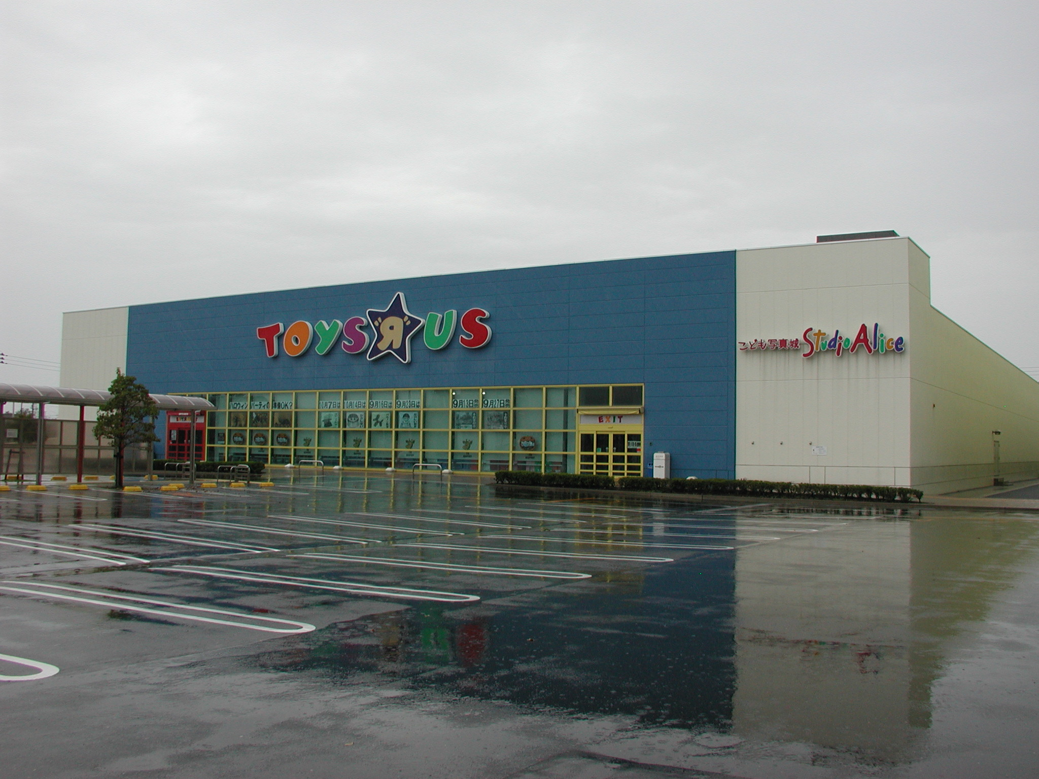 ピアドゥ：トイザらス八戸店（店内にて、こども写真城ja:スタジオアリス八戸店も併設）